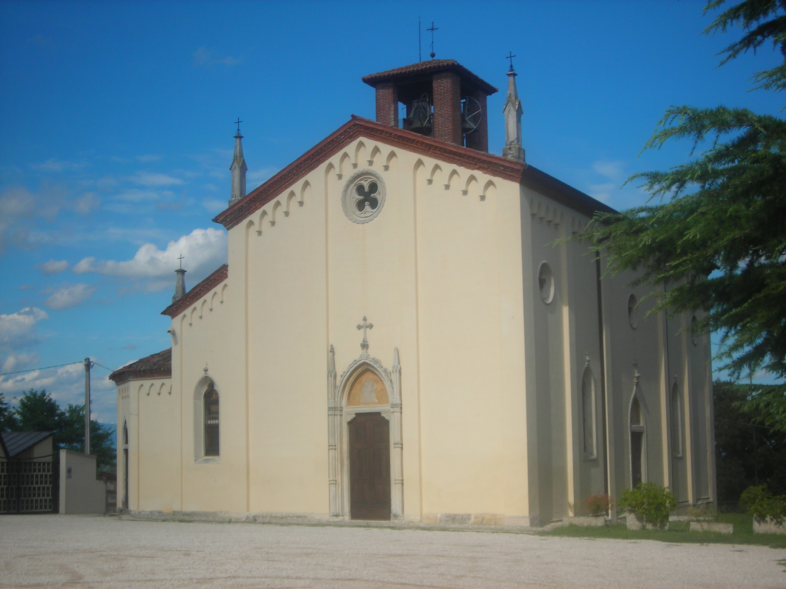 foto della Chiesa vecchia di San Giorgio Martire